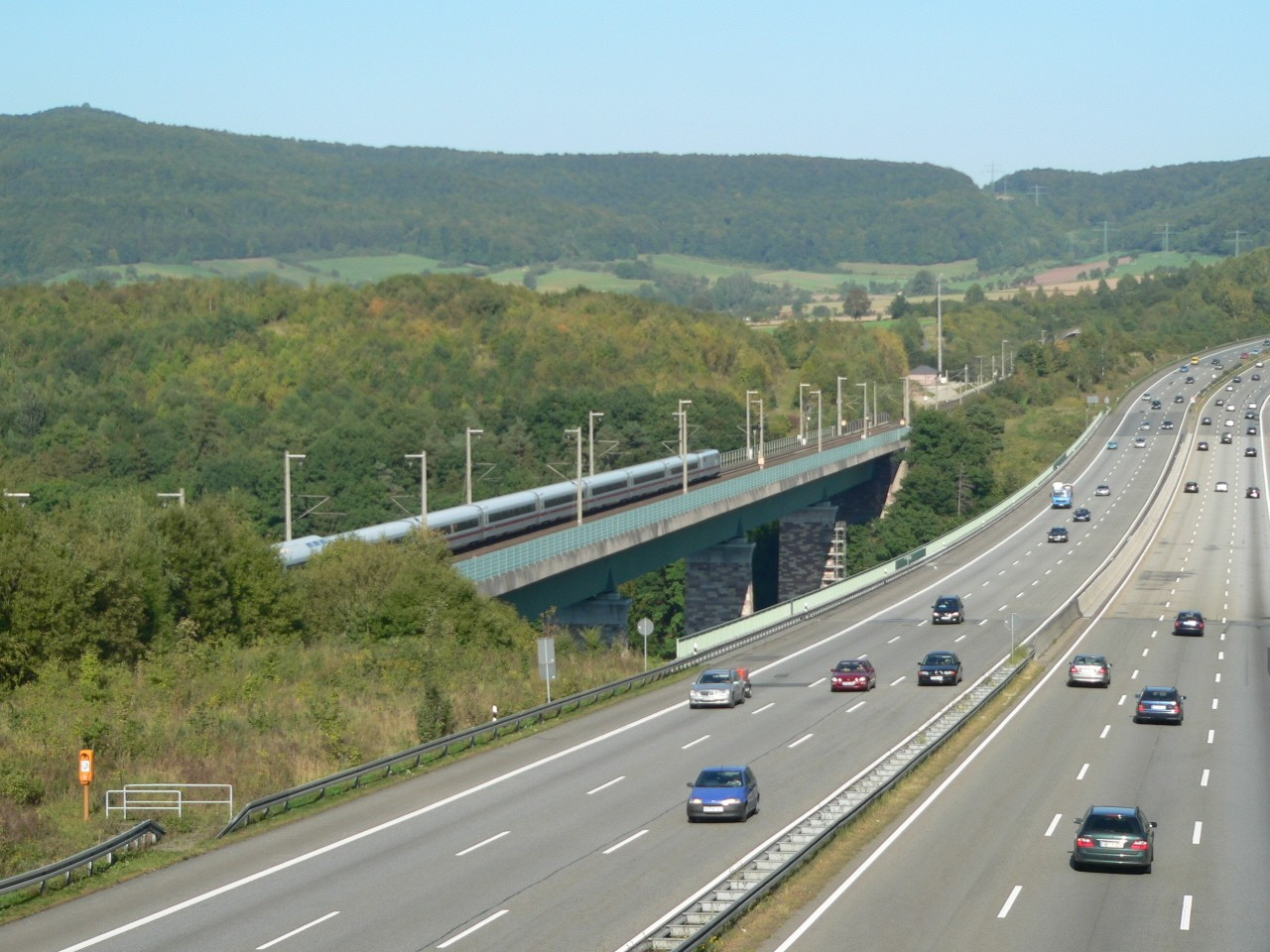 Werratalbrücke der ICE-Strecke Wuerzburg - Hannover. Rechts daneben Werratalbrücke der A 7.